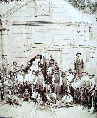 Mine Pulacayo-Huanchaca, Bolivien